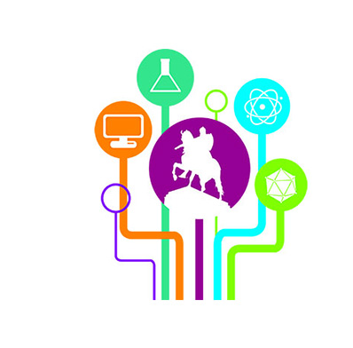 Մեգապոլիսների օլիմպիադայի լոգոն